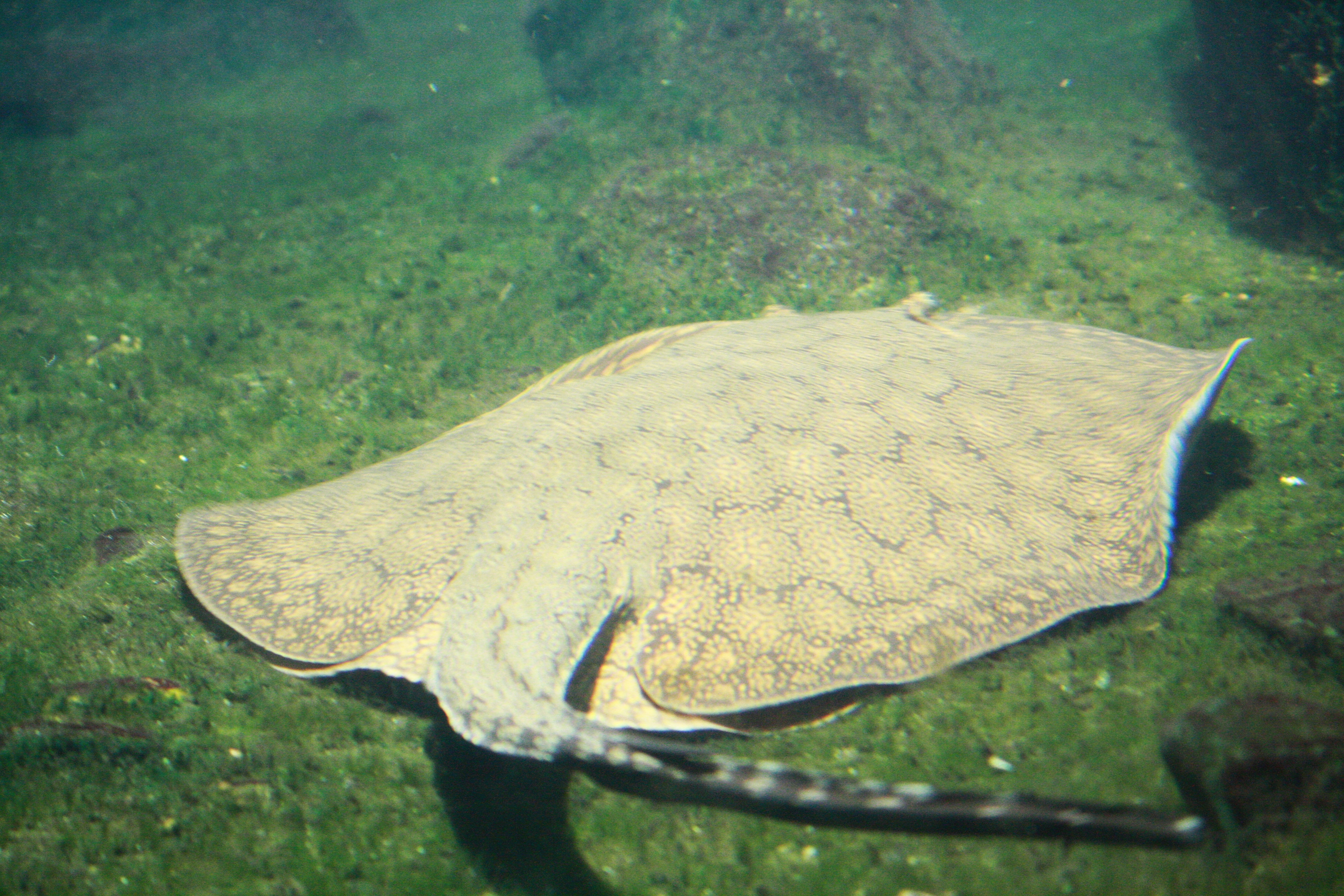 Zoo Praha